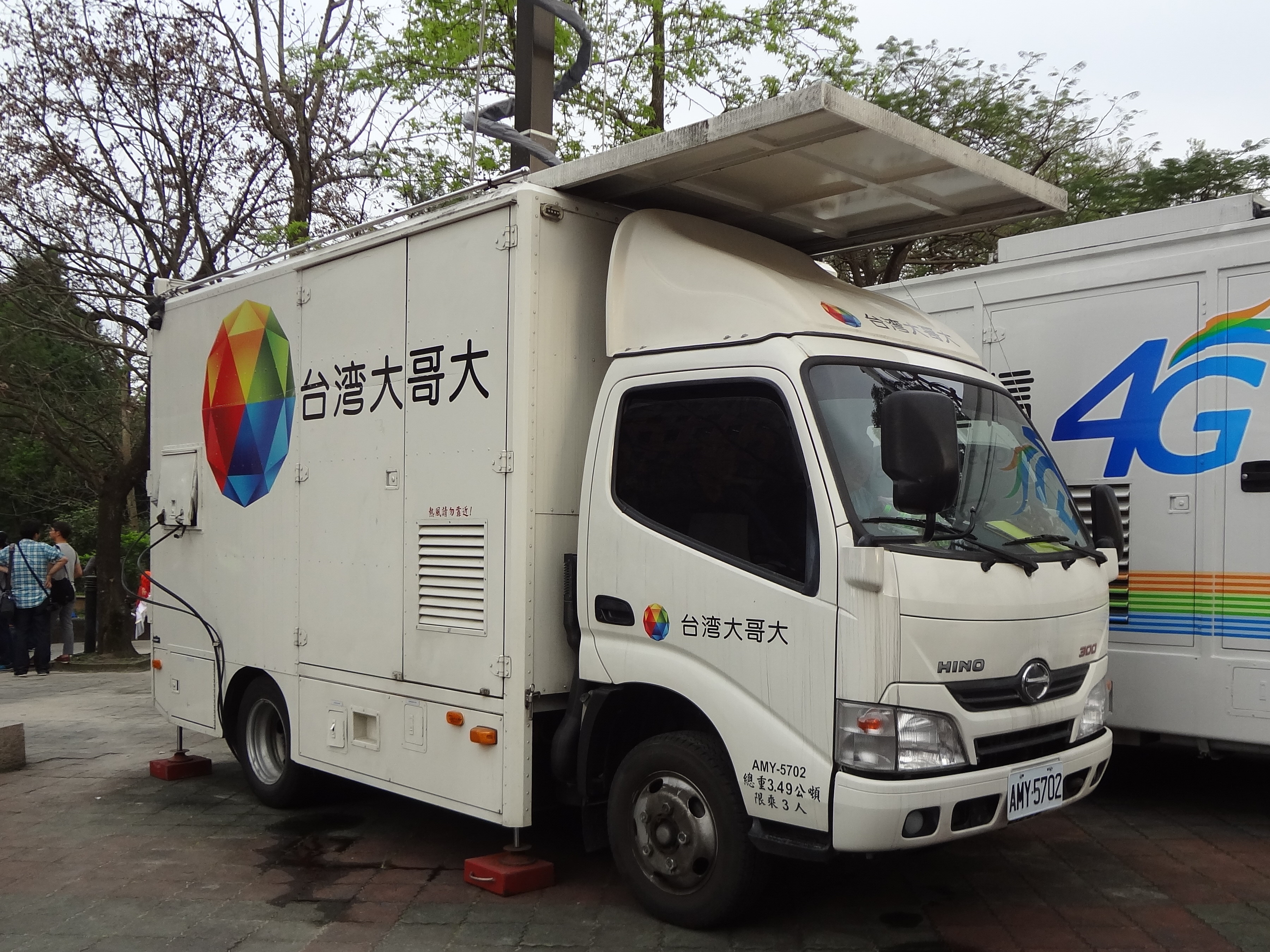 第48屆台灣同人誌販售會，國立臺灣大學綜合體育館外，台灣大哥大日野300行動基地台車AMY-5702。